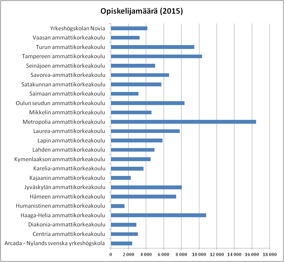 Opiskelijamäärä ammattikorkeakouluittain vuonna 2015